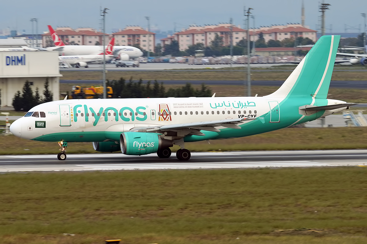 Flynas, VP-CYF, Airbus A319-112